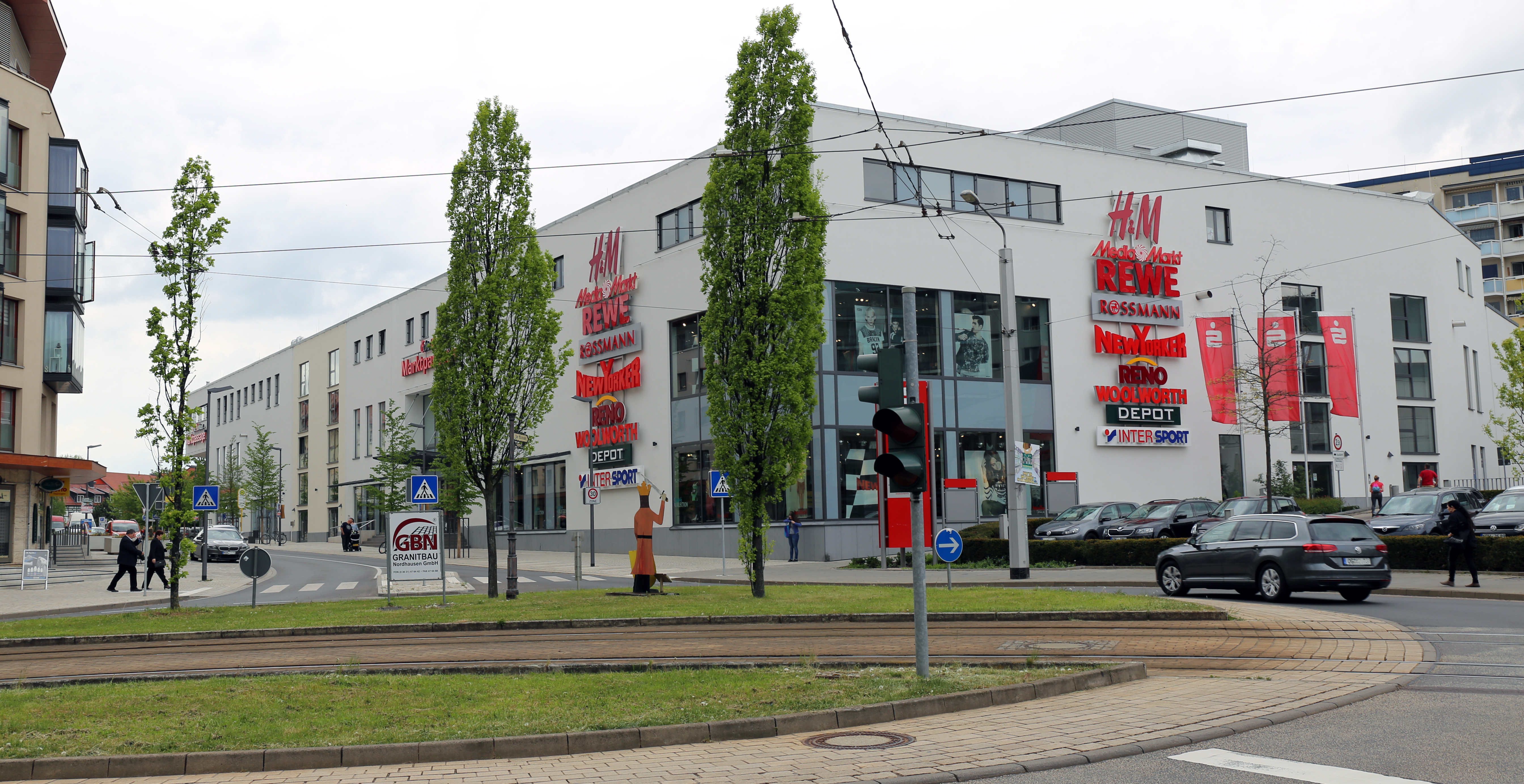 Echte Nordhäuser Marktpassage